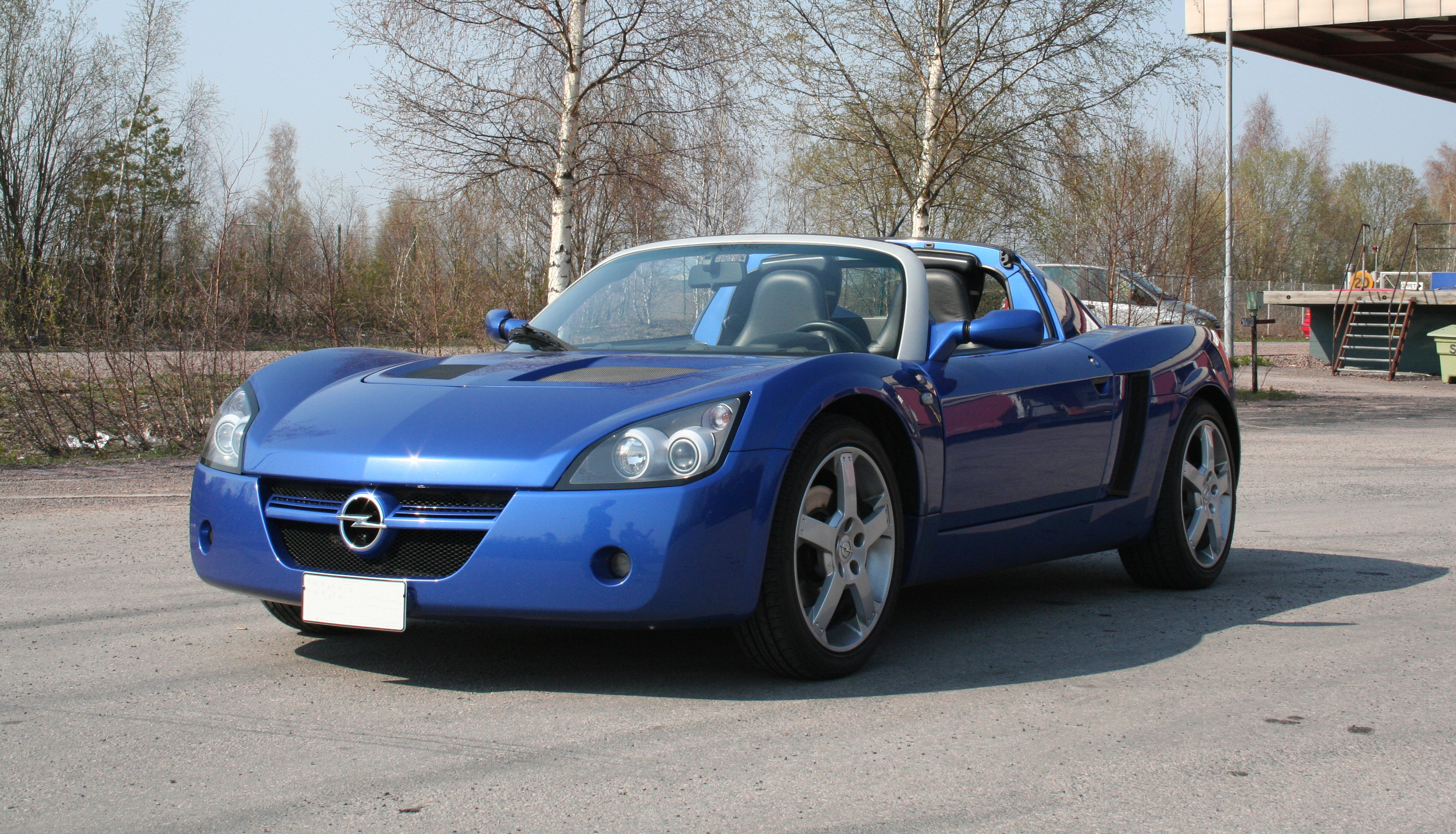 Opel Speedster 2.2 EuropaBlue